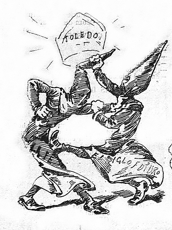 Recorts del mes de agost.